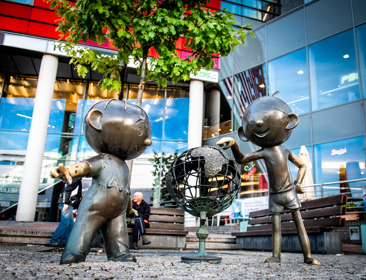 Bielsko-Biała Bolek i Lolek 1